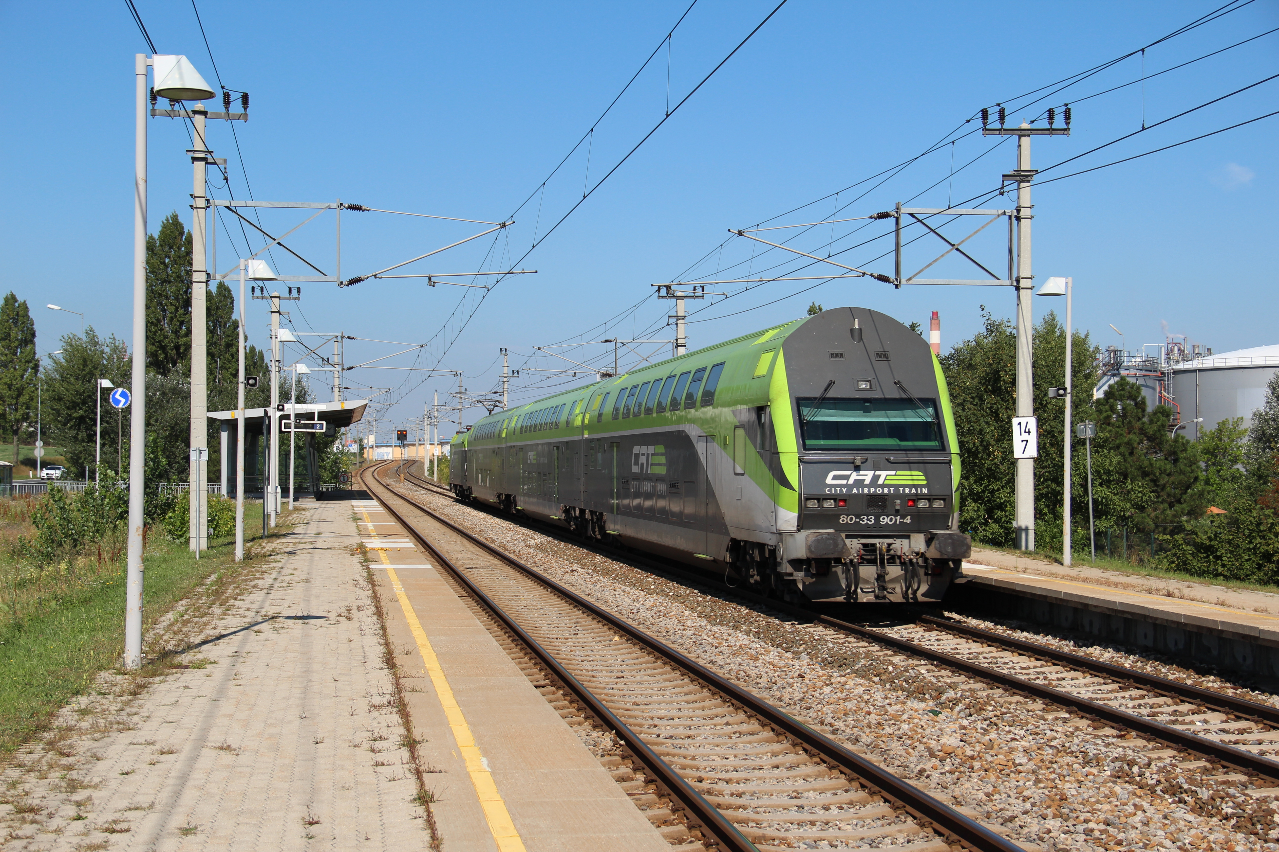 Ein CAT durchfährt die Haltestelle Mannswörth am Weg nach Wien Mitte.